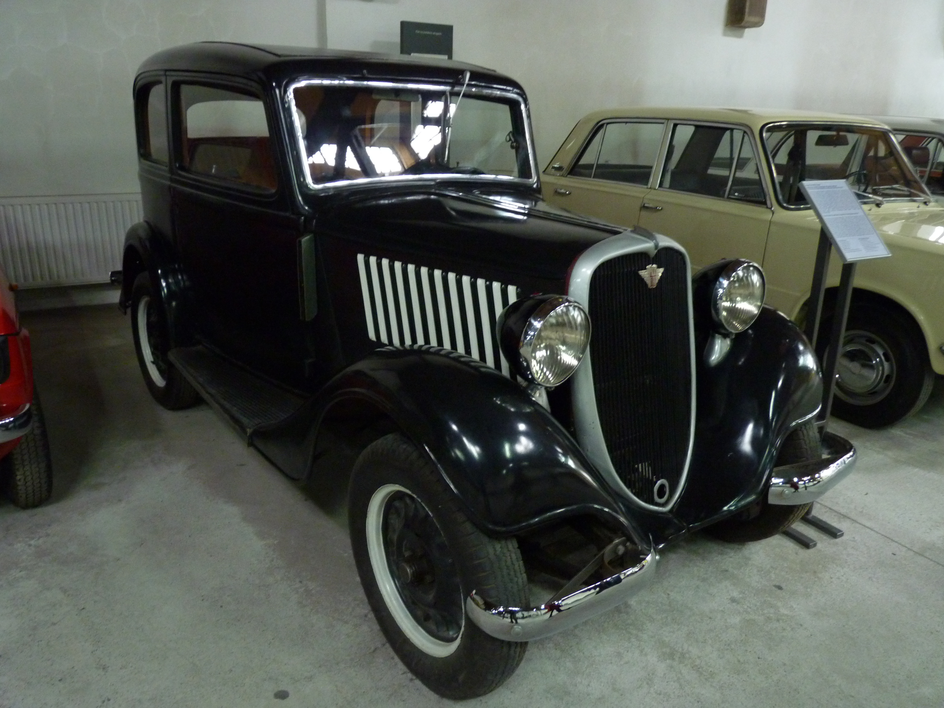 Polski Fiat 508 III Junak at the Muzeum Inżynierii Miejskiej in Kraków.